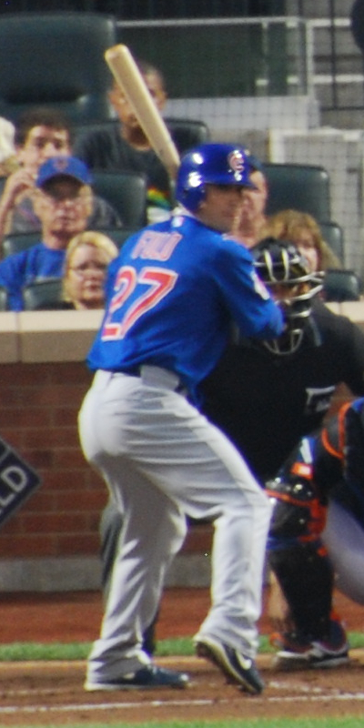 Sam Fuld